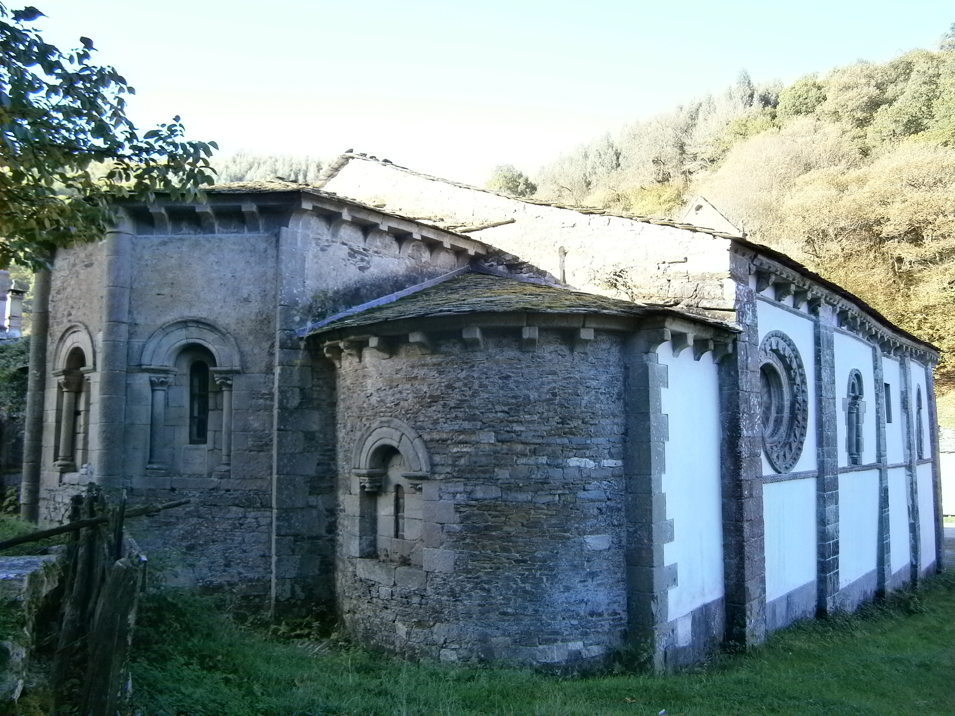 Convento de Santa María de Penamaior